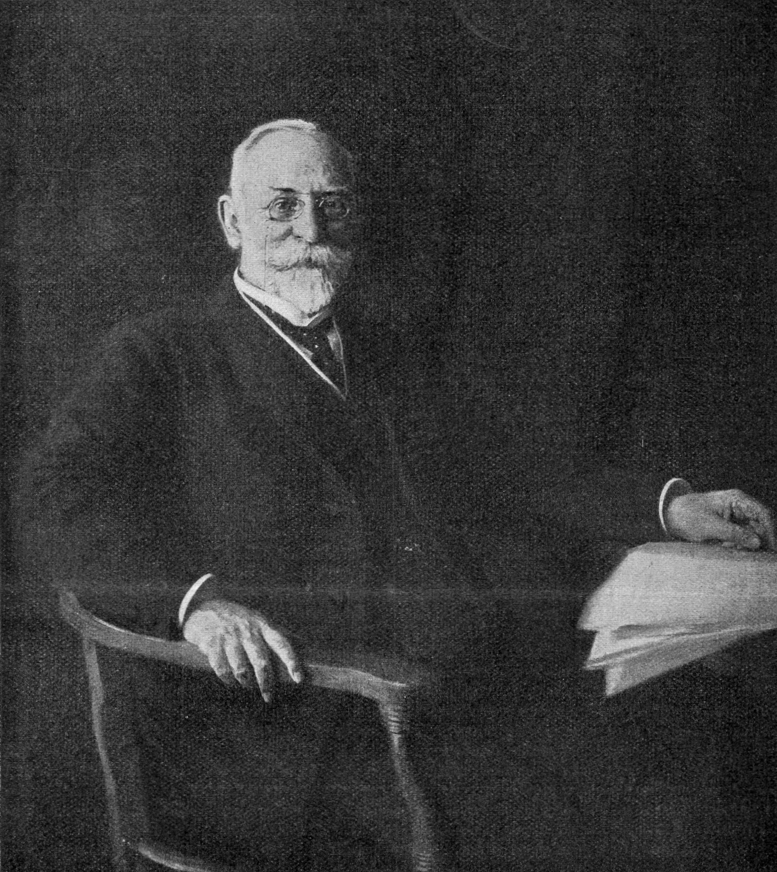 Portait des Bauingenieurs Heinrich Schwieger